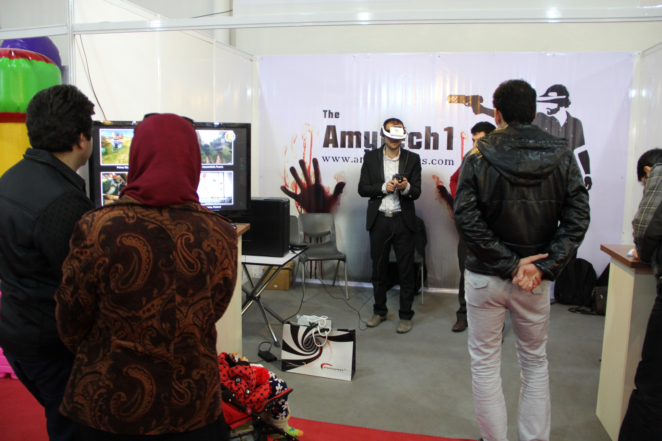 رونمایی از هدست واقعیت مجازی استودیو آمیتیس در چهارمین دوره نمایشگاه شهربازی و اوقات فراغت